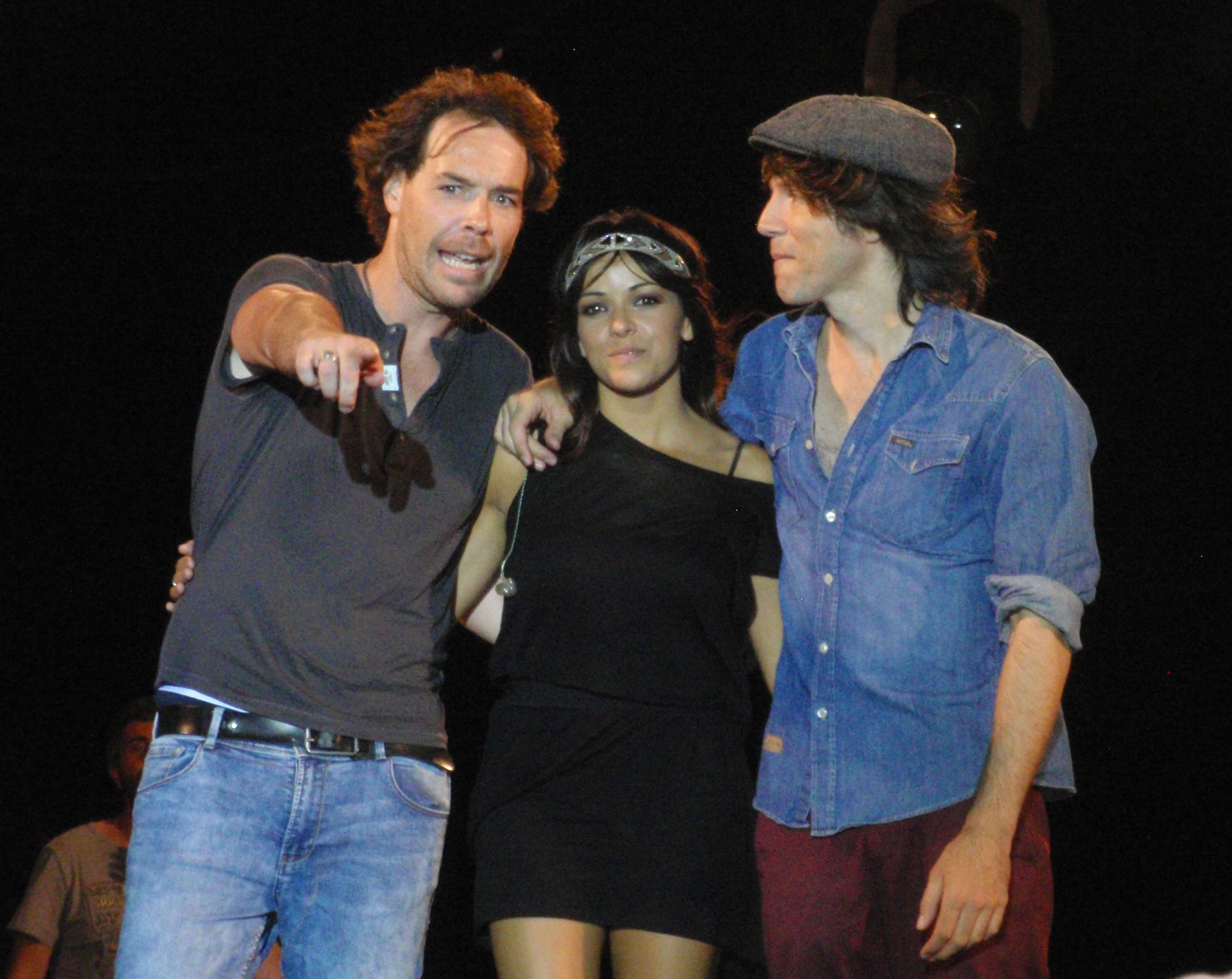 Actuación del grupo El sueño de Morfeo en San Lorenzo de El Escorial el día 10 de agosto de 2012.